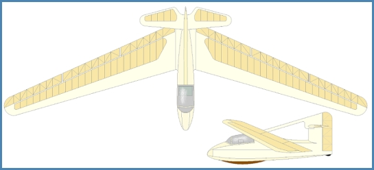 DFS 42